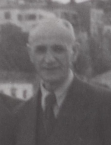 Писателят Никола Данчов на литературно четене в Кавала